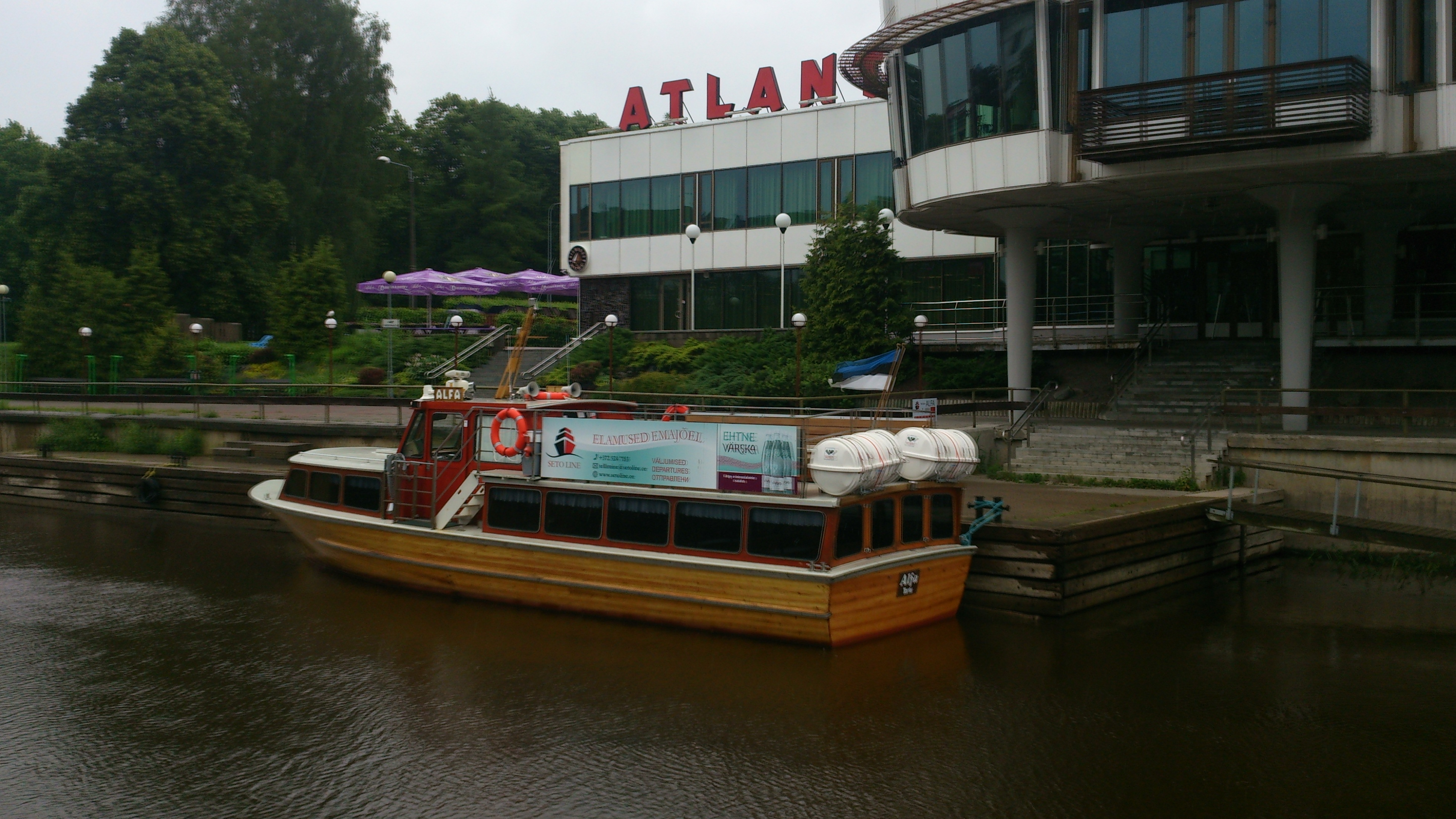 Jõelaev Alfa Emajõel Atlantise kai ääres, 29. juuni 2014